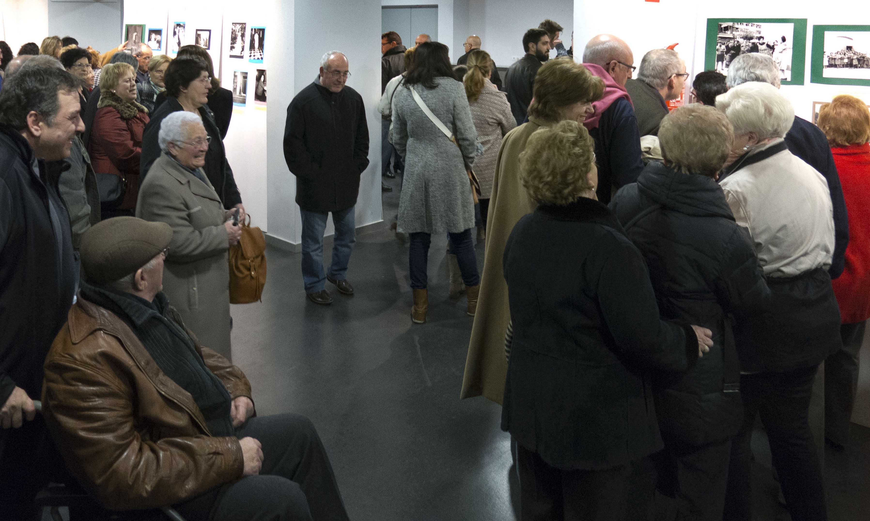 L'Ajuntament d'Alginet, amb imatges de l'Arxiu Ismael Latorre Mendoza, va organitzar l'exposició La força de la dona. Es va inaugurar el divendres, quatre de març, a les 19'30h, al Teatre Modern d'Alginet de l'any 2016. 74 revelats fotogràfics d'Ismael Latorre.